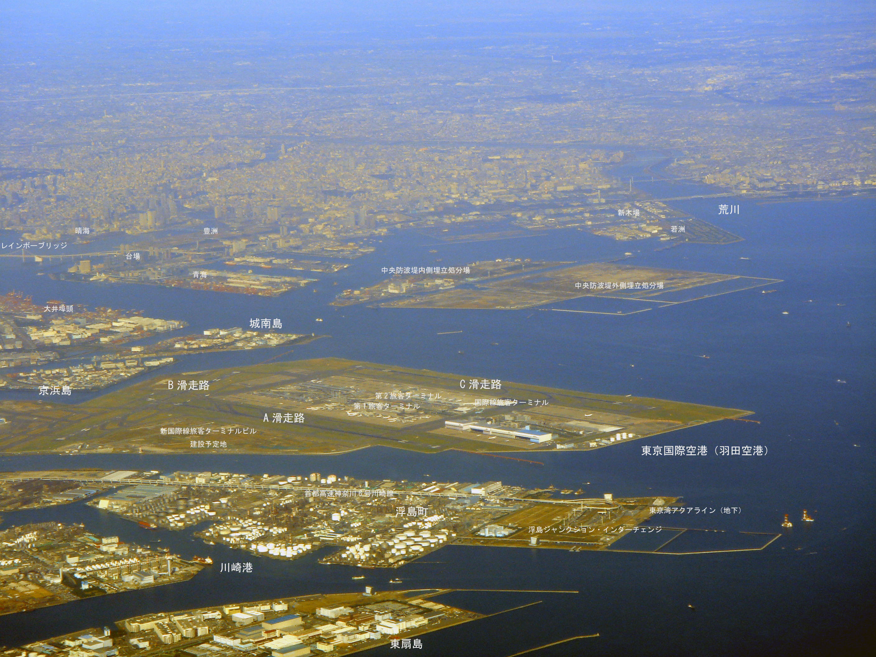 東京国際空港（羽田空港）空撮